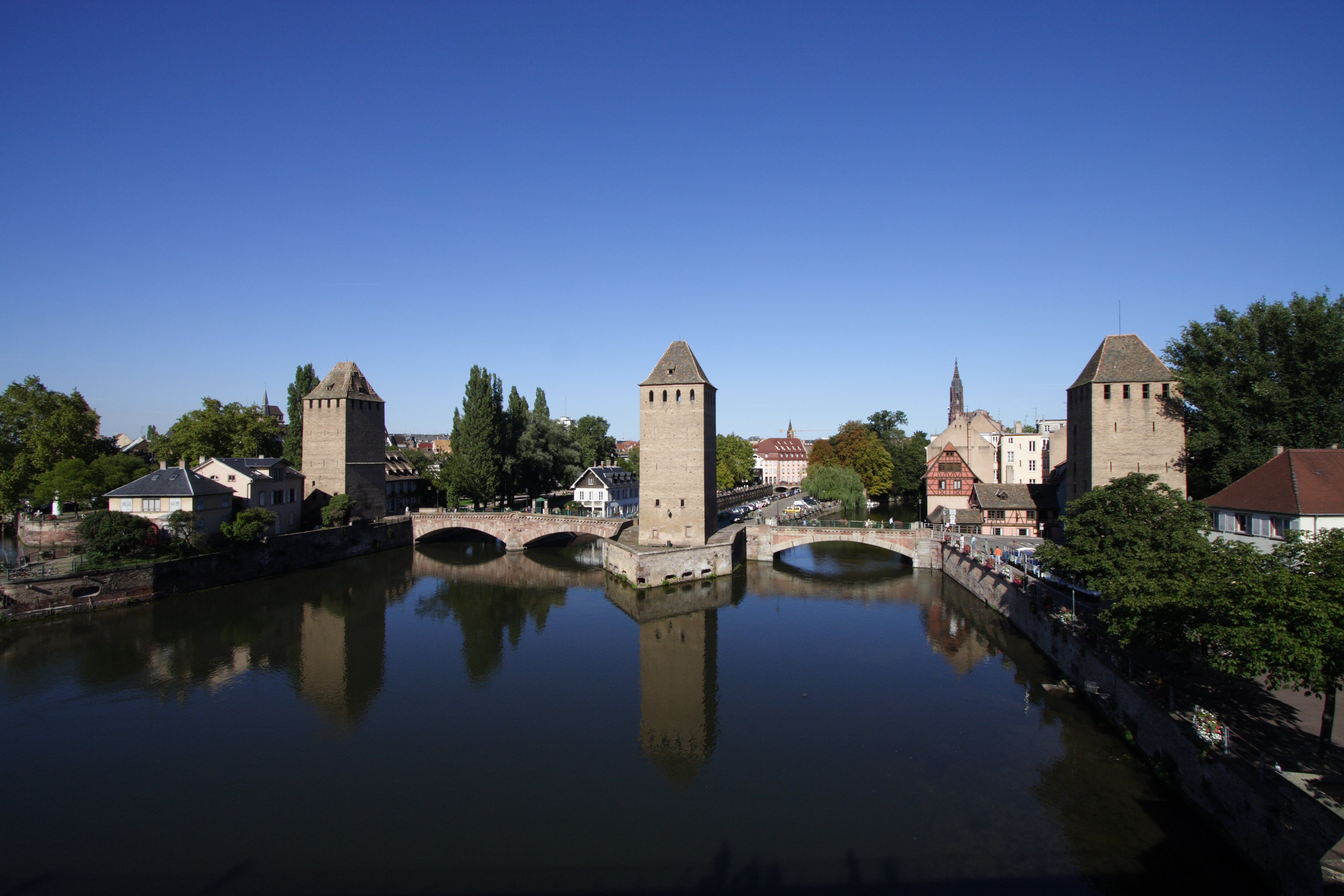 Ponts Couverts(Strasbourg, France)